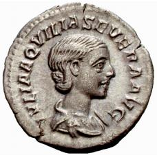 Struck under Elagabalus. Denarius (2, 97g), Rome: IVLIA AQVILIA SEVERA AVG, draped bust. RIC:225, C:2